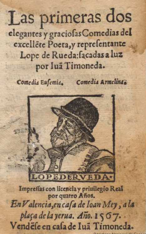 Las quatro comedias y dos coloquios pastoriles / del excellente poeta, y gracioso representante Lope de Rueda. ; dirigidas por Ioan Timoneda al illustre señor don Martin de Bardaxin ... En Valencia, en casa de Juan Mey, 1567. Grabado xilográfico con el retrato del autor. Biblioteca Nacional de España.